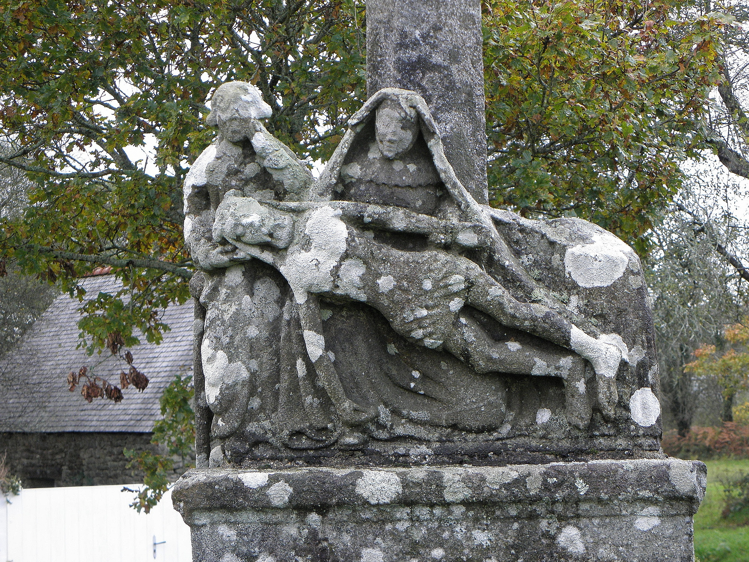 Déploration sur le corps du Christ à la base du calvaire de Nestavel en Brennilis (29).